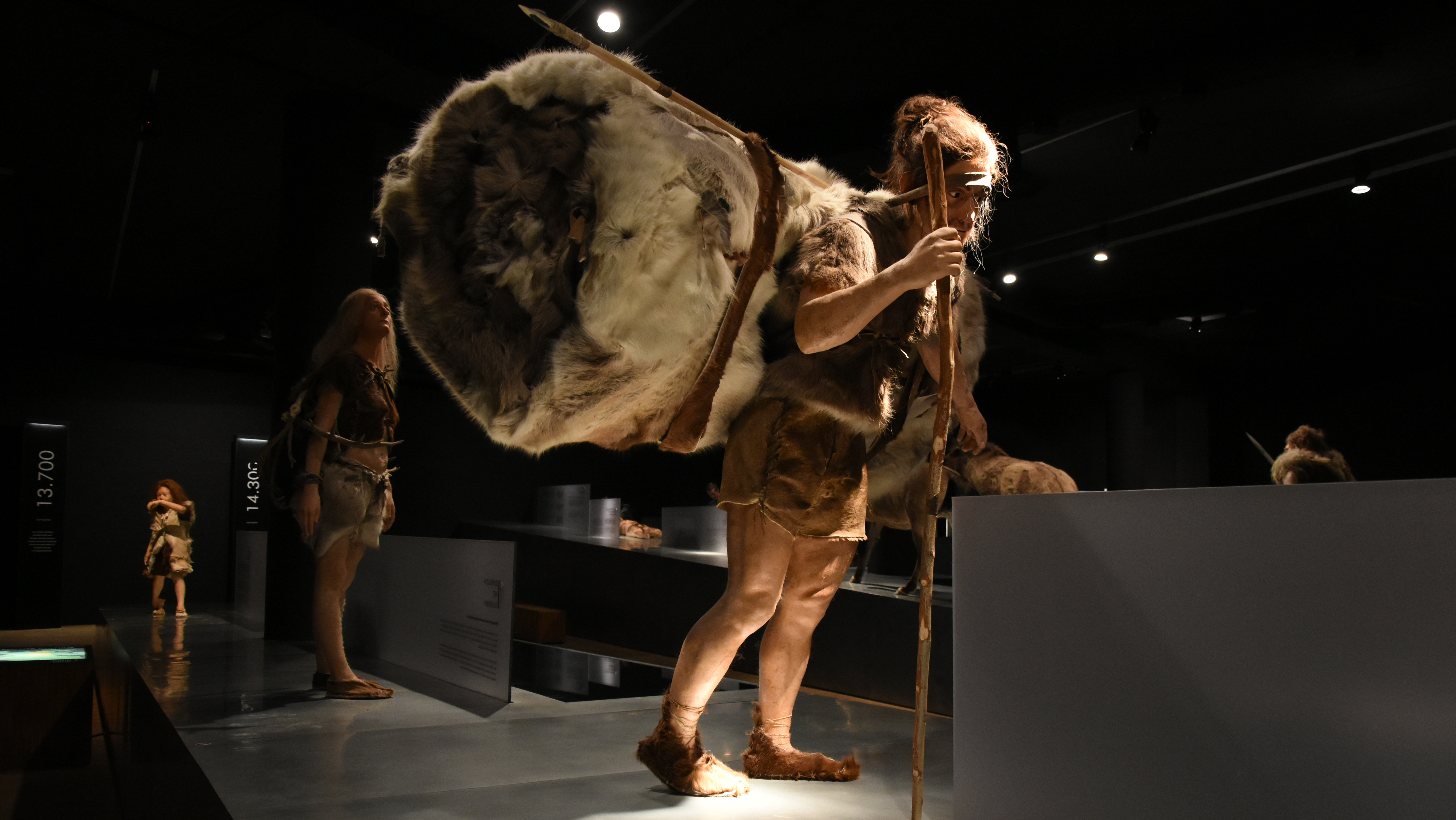 Neanderthaler Gallo-Romeins Museum (Tongeren) 24-03-2018 14-23-16